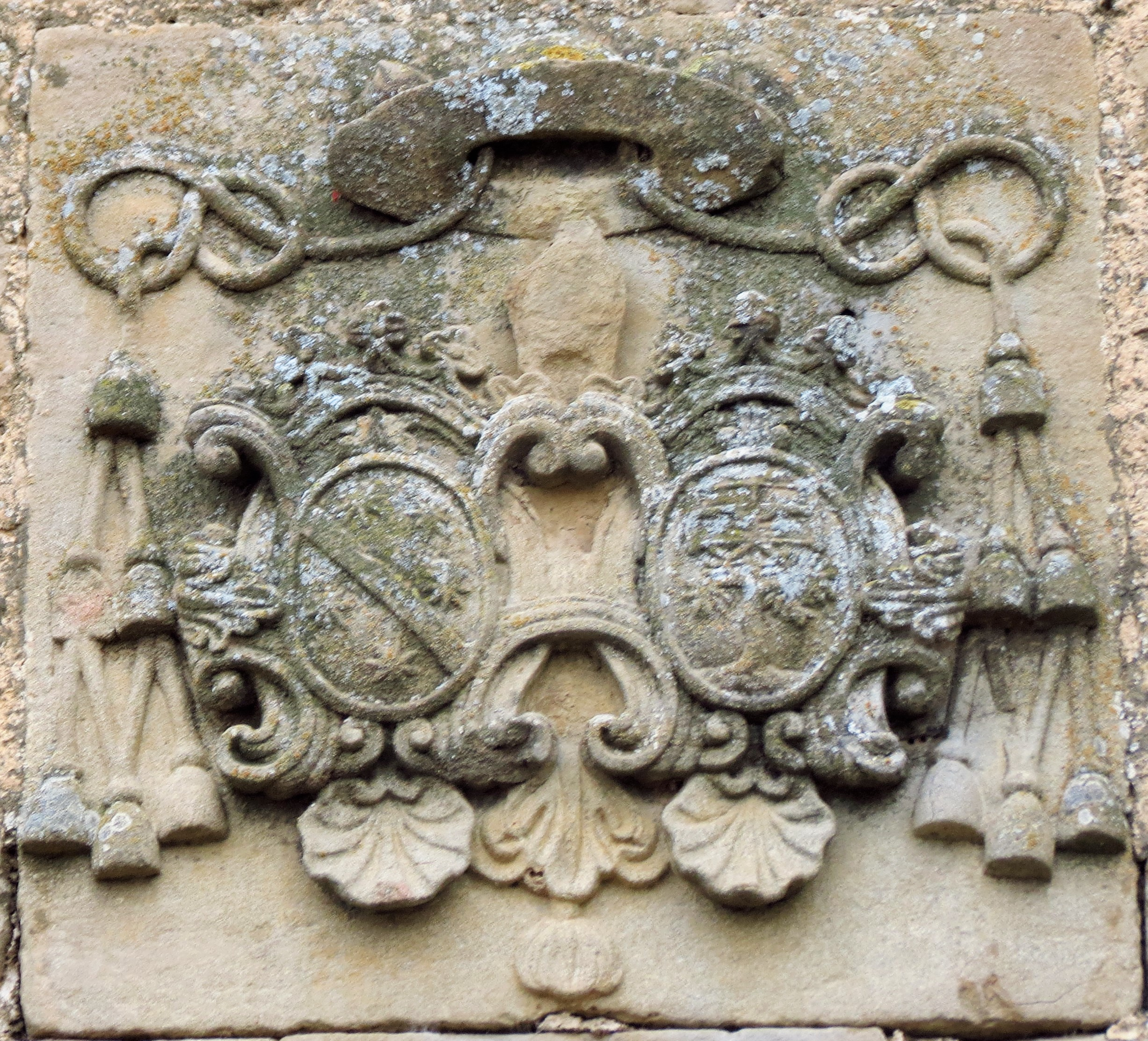 exterior